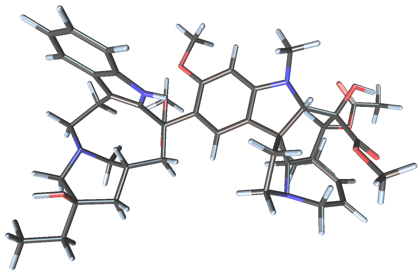 Vinblastine stick molecular model